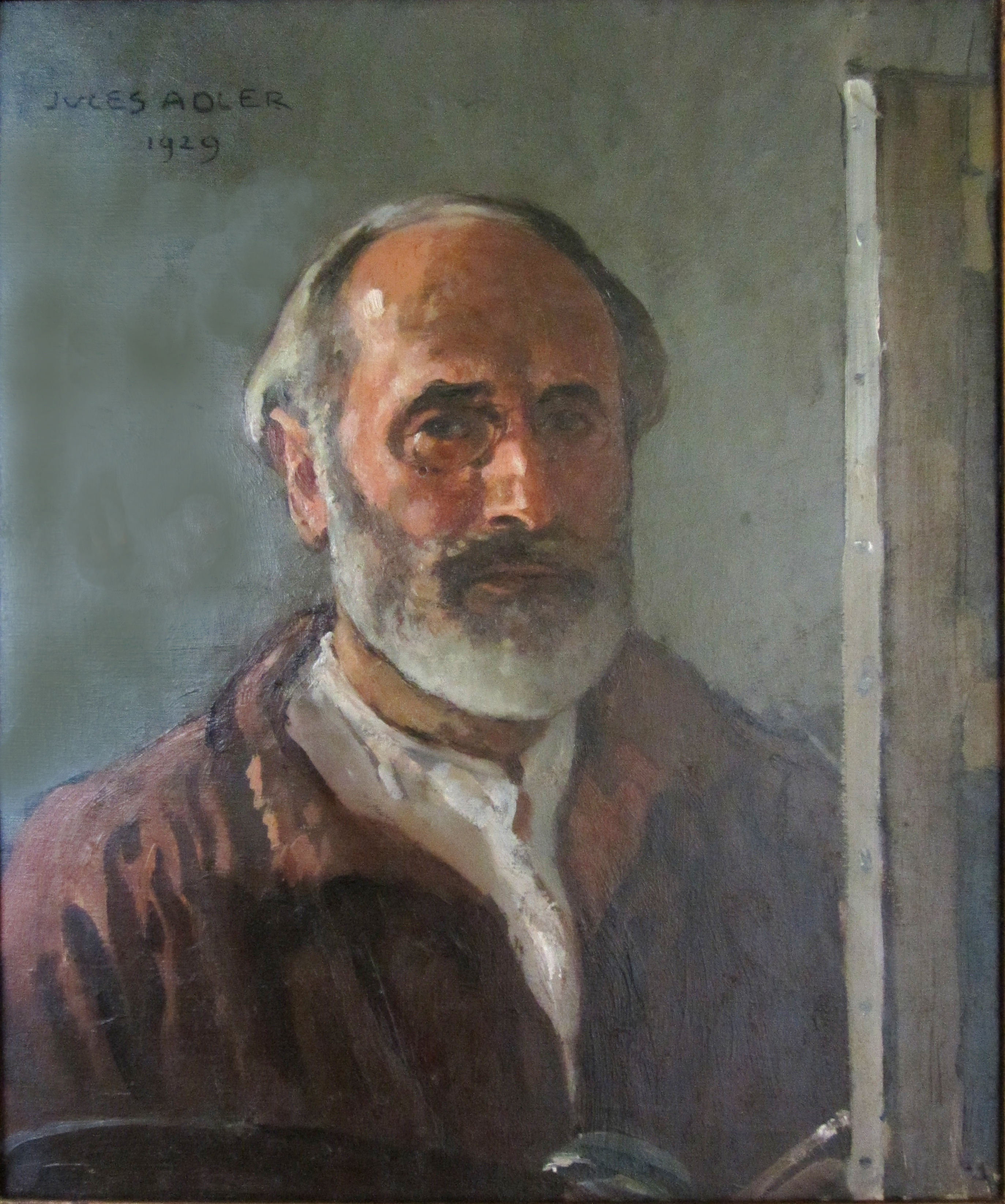 Autoportrait de Jules Adler (1865-1952)